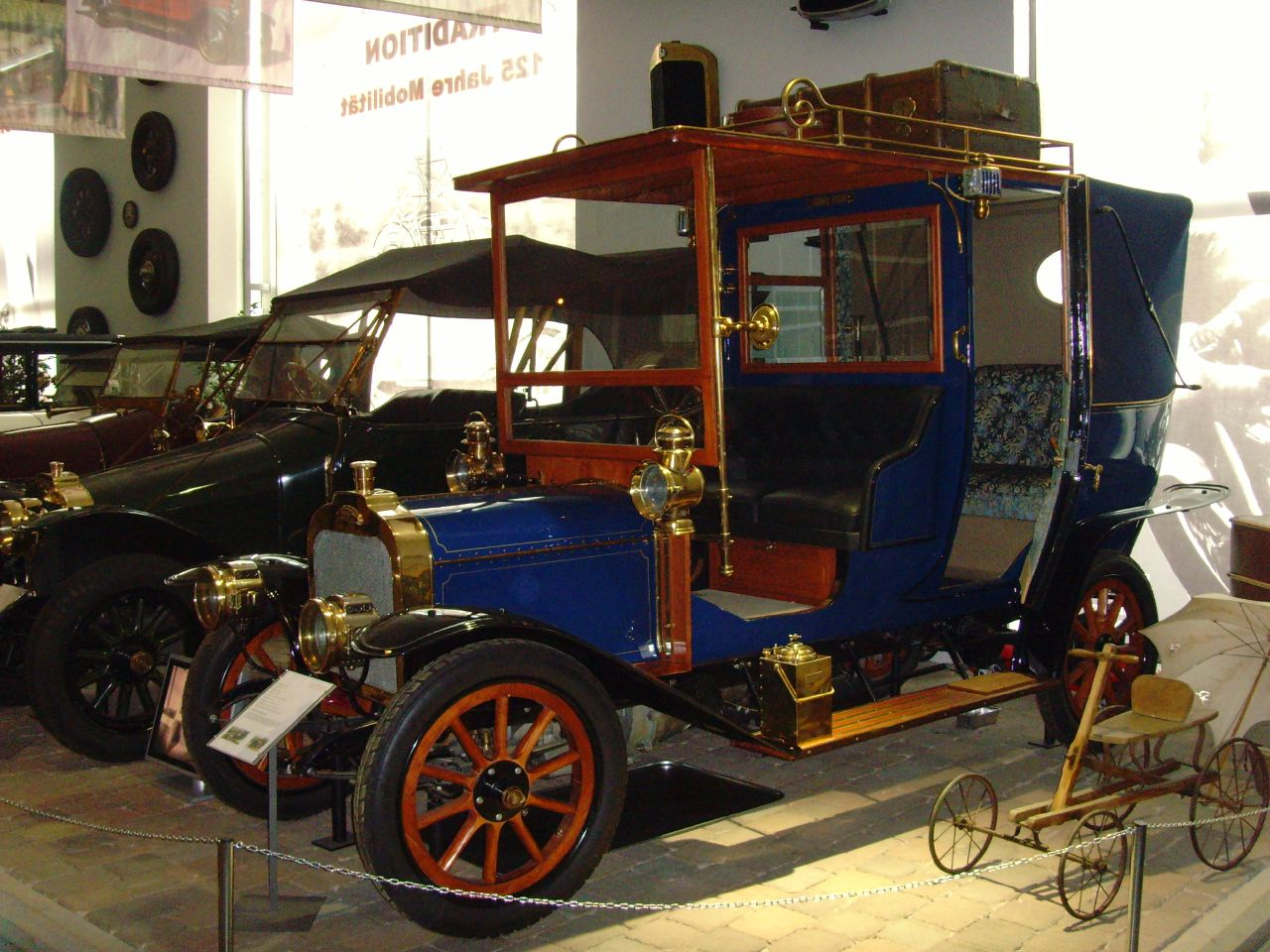 Museum AUTOVISION Tradition & Forum, Altlußheim